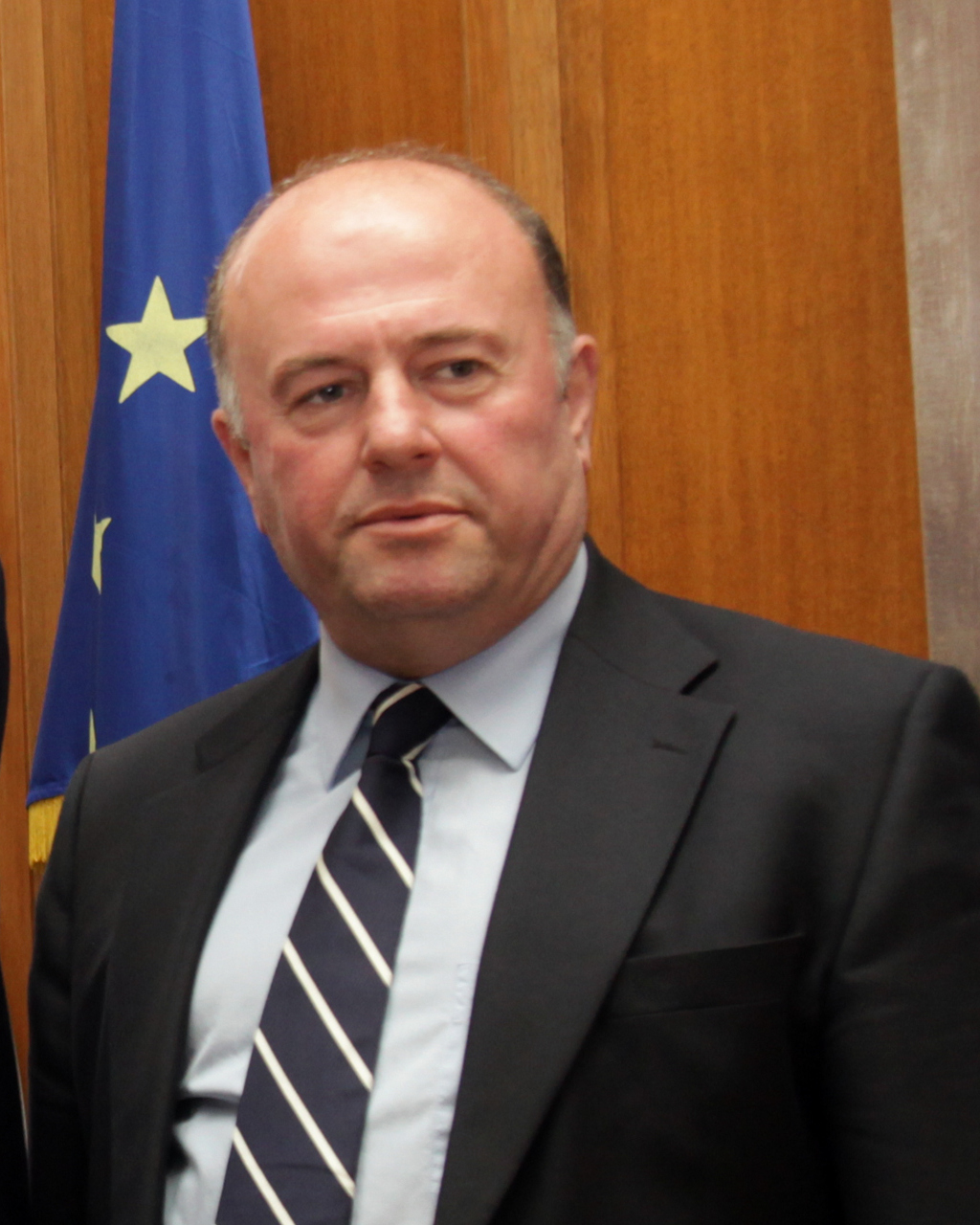 Vasil Bollano in May 2011